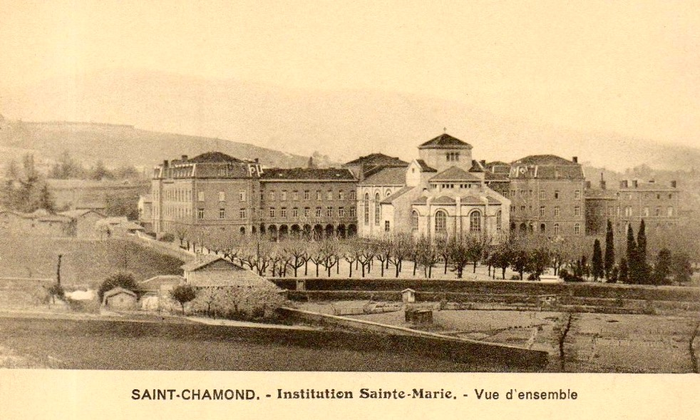 Collège Sainte-Marie à Saint-Chamond, carte postale ancienne.